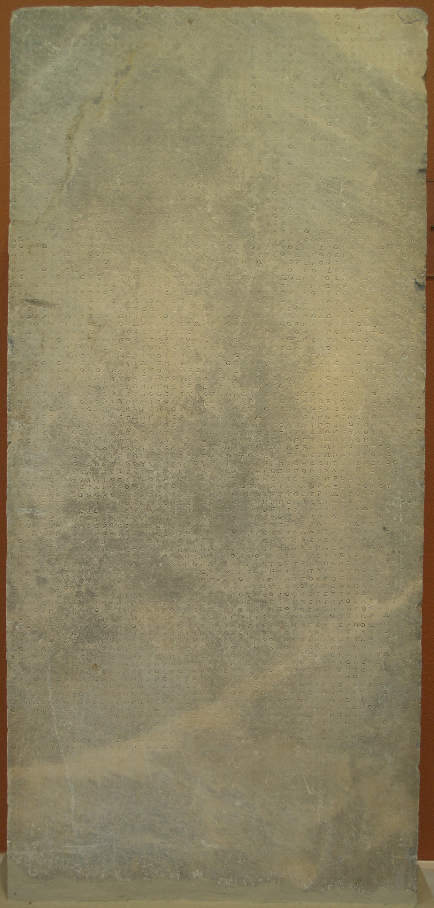 Spécifications (syngraphai) pour la construction de l'arsenal (skeuotheke) du Pirée, confiée aux architectes Euthydomos et Philon. 347/346 av. J.-C.